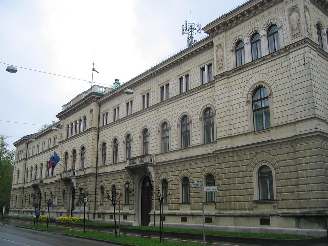 Slovene Government Palace, Ljubljana photo:Ziga 20:53, 8 May 2006 (UTC)